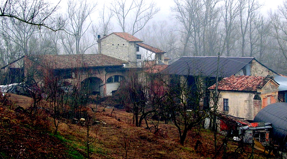 Il complesso di Case degli Orsi di gazzoli con l'oratorio, oggi